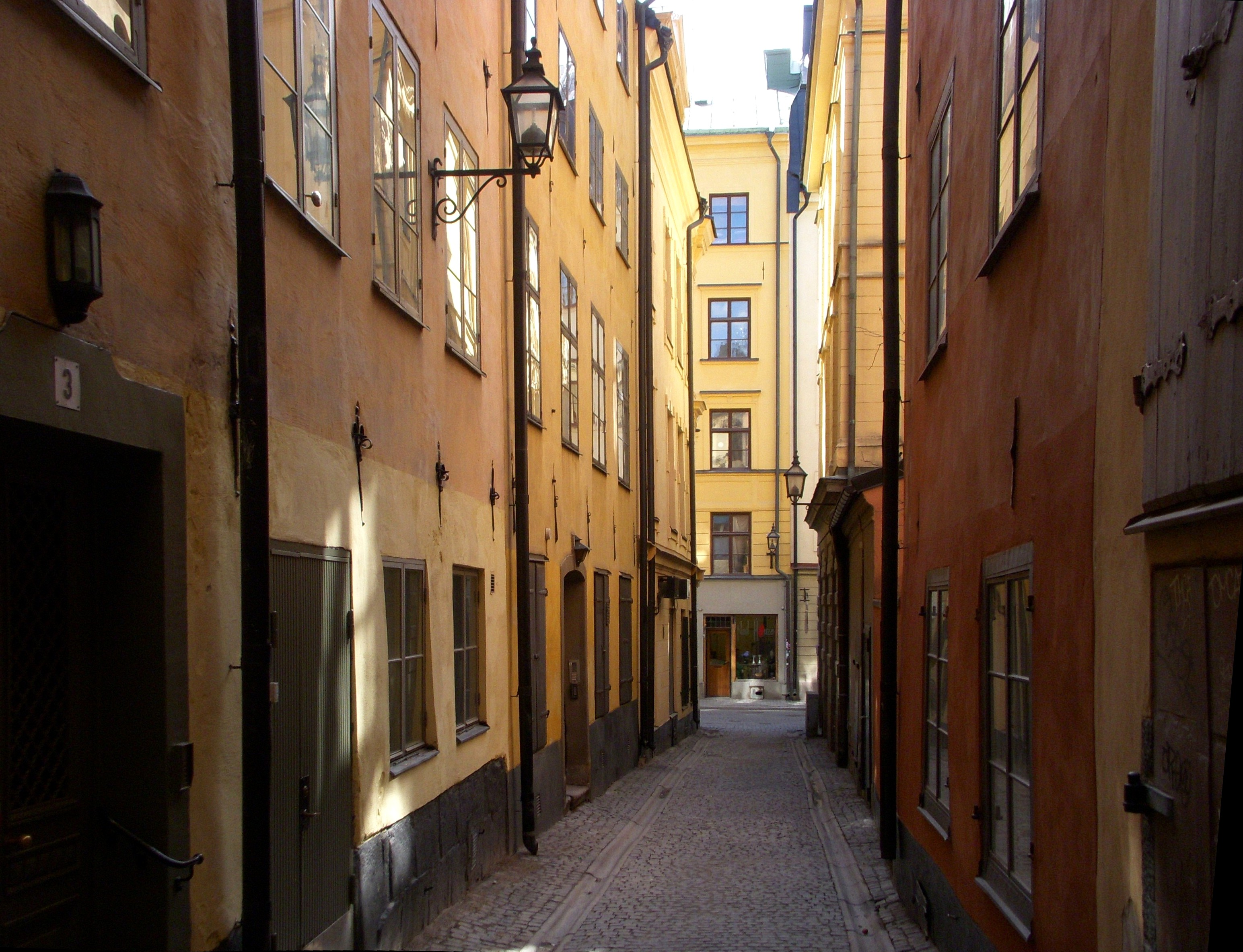 Helga Lekamens gränd i Gamla stan, vy mot Stora Nygatan, Kvarteret Erisichton till vänster och Kvarteret Pyreneus till höger